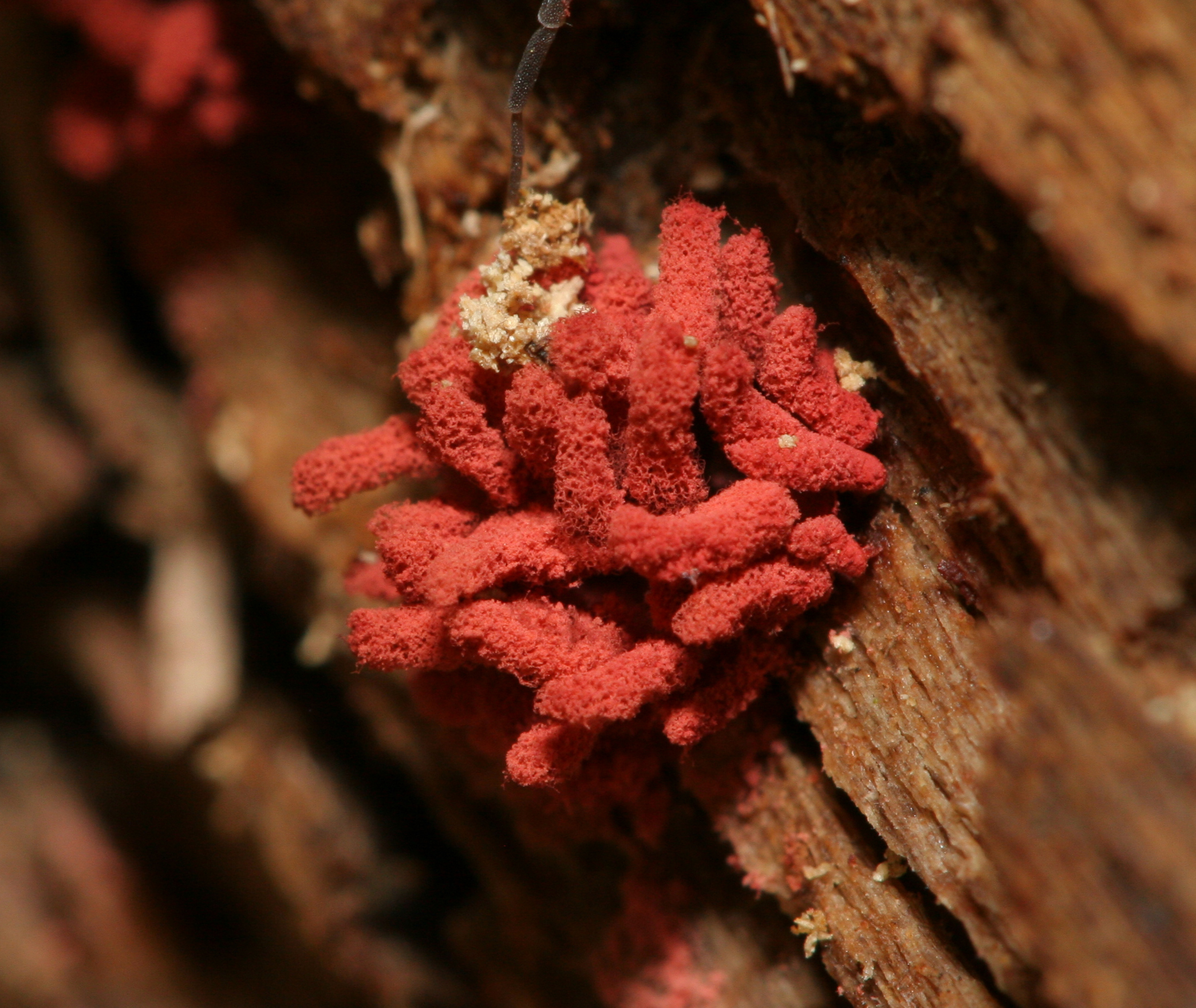 Red Slime Mold